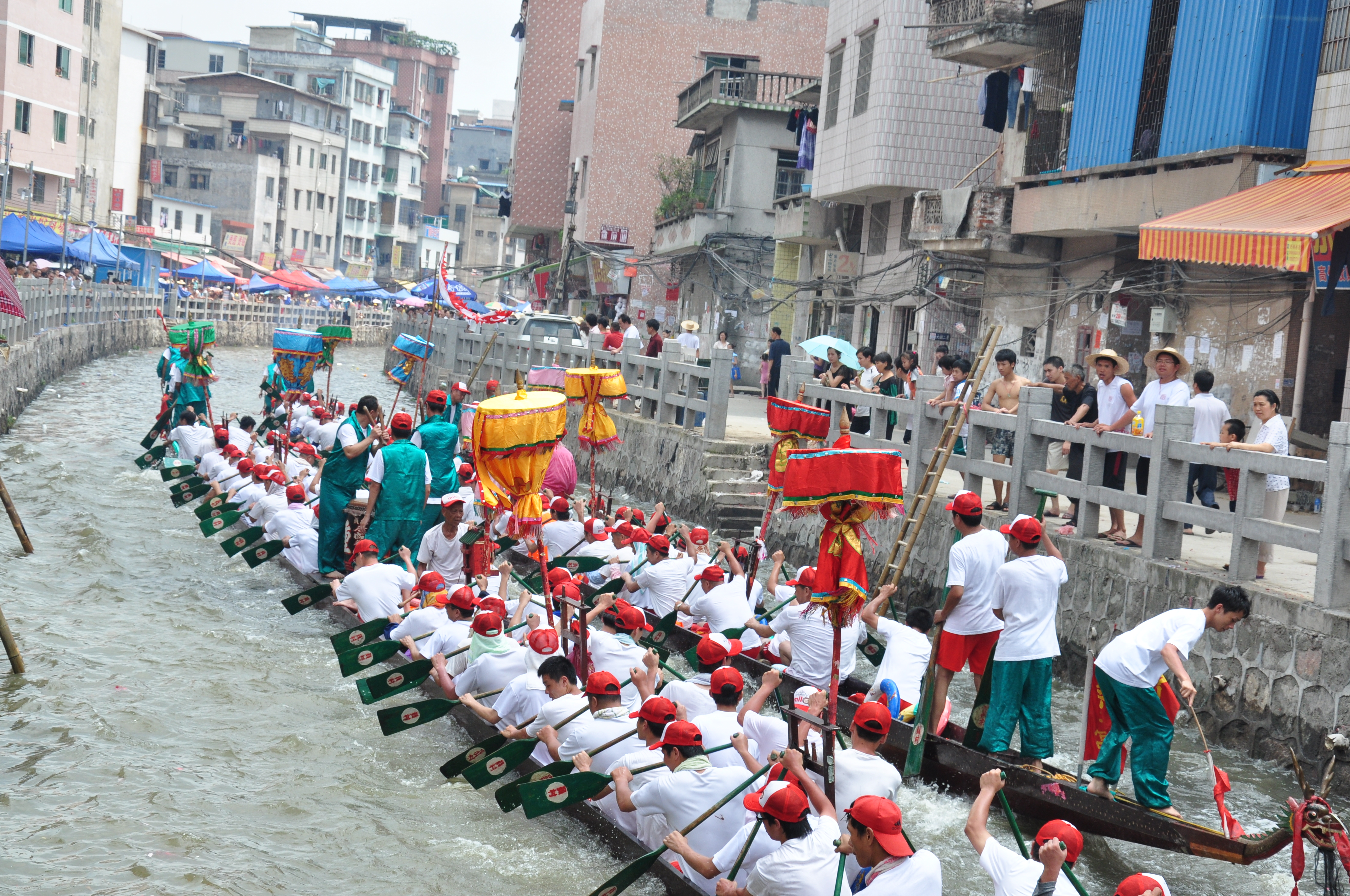 中文（香港）: 亞運河涌整治后的第一年大塘龍船景 - 員村龍船